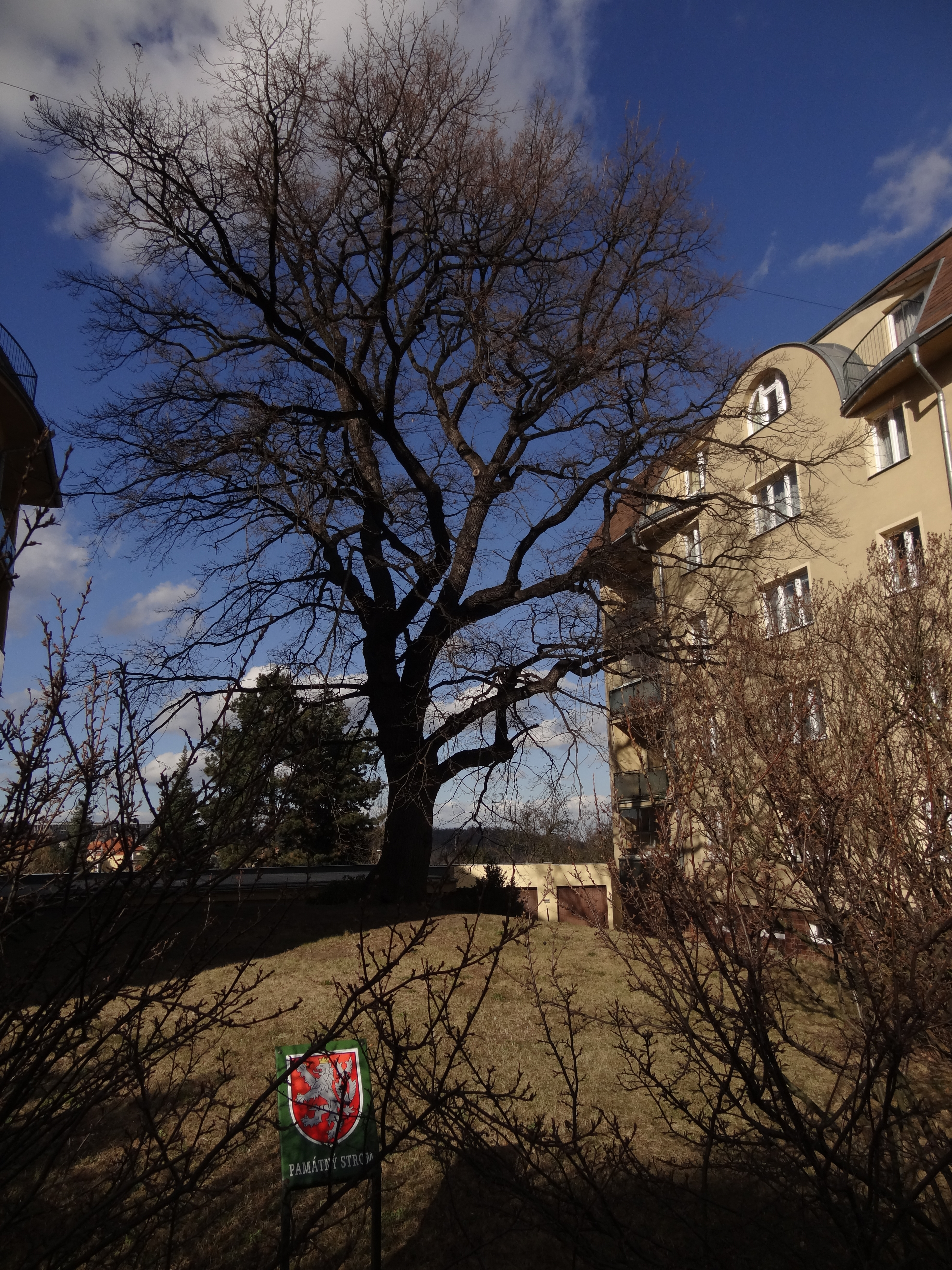 Smíchov - památný dub letní v ulici U Malvazinky